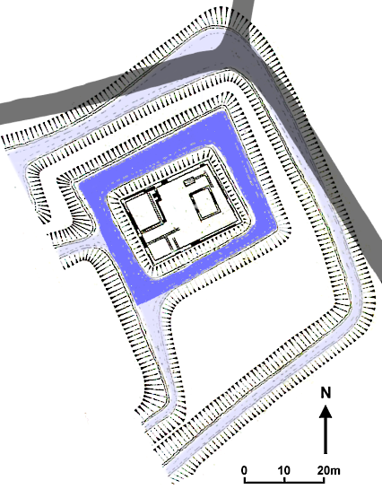 Rekonstruktion des Grundrisses der Motte Kippekausen in Bergisch Gladbach Refrath, Deutschland.